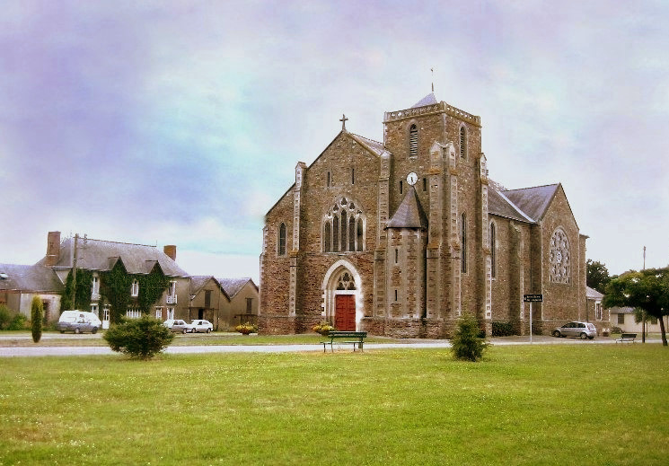 Eglise de Notre-Dame-des-Langueurs